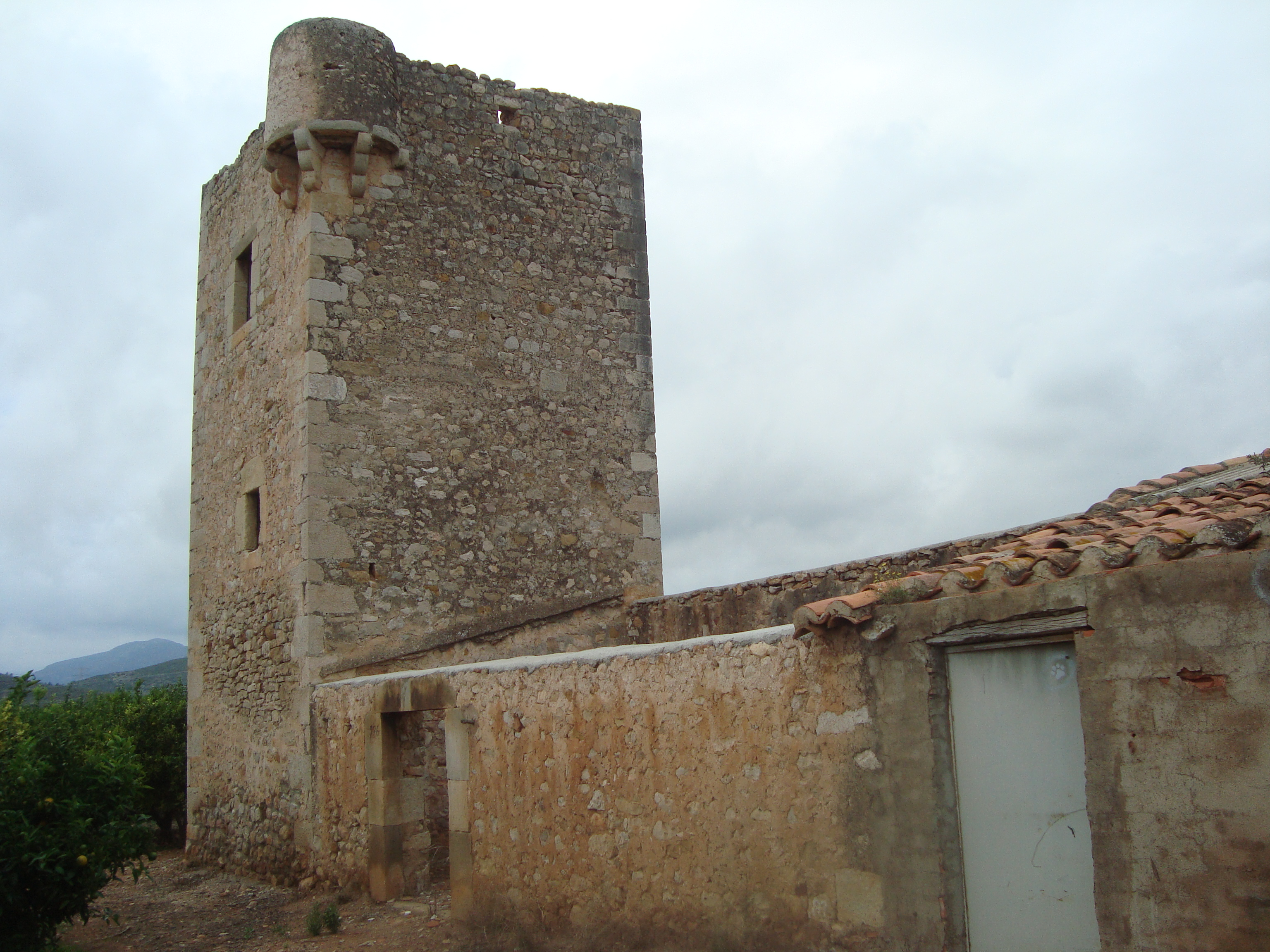 Torre de refugio y defensa, época medieval